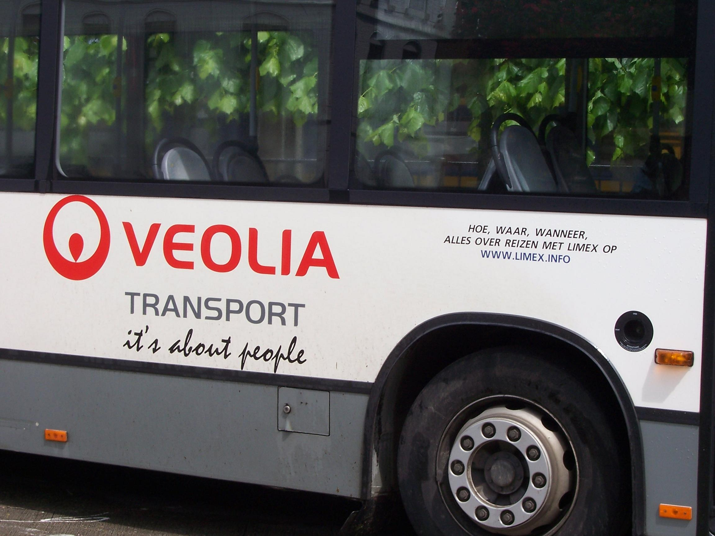 Bij publicatie naam Maurits Vink vermelden Categorie:Afbeelding bus